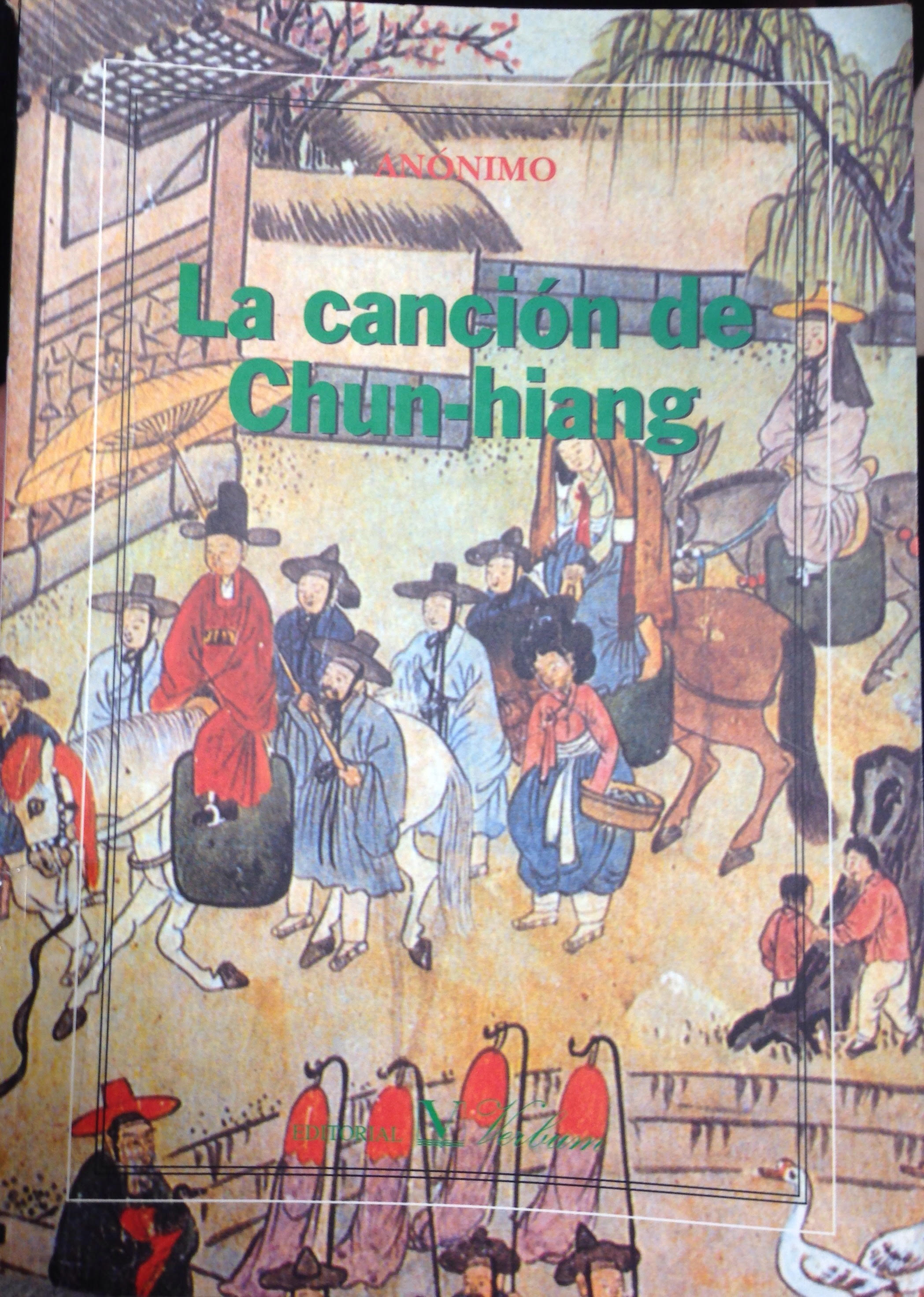 Portada de la edición de Verbym